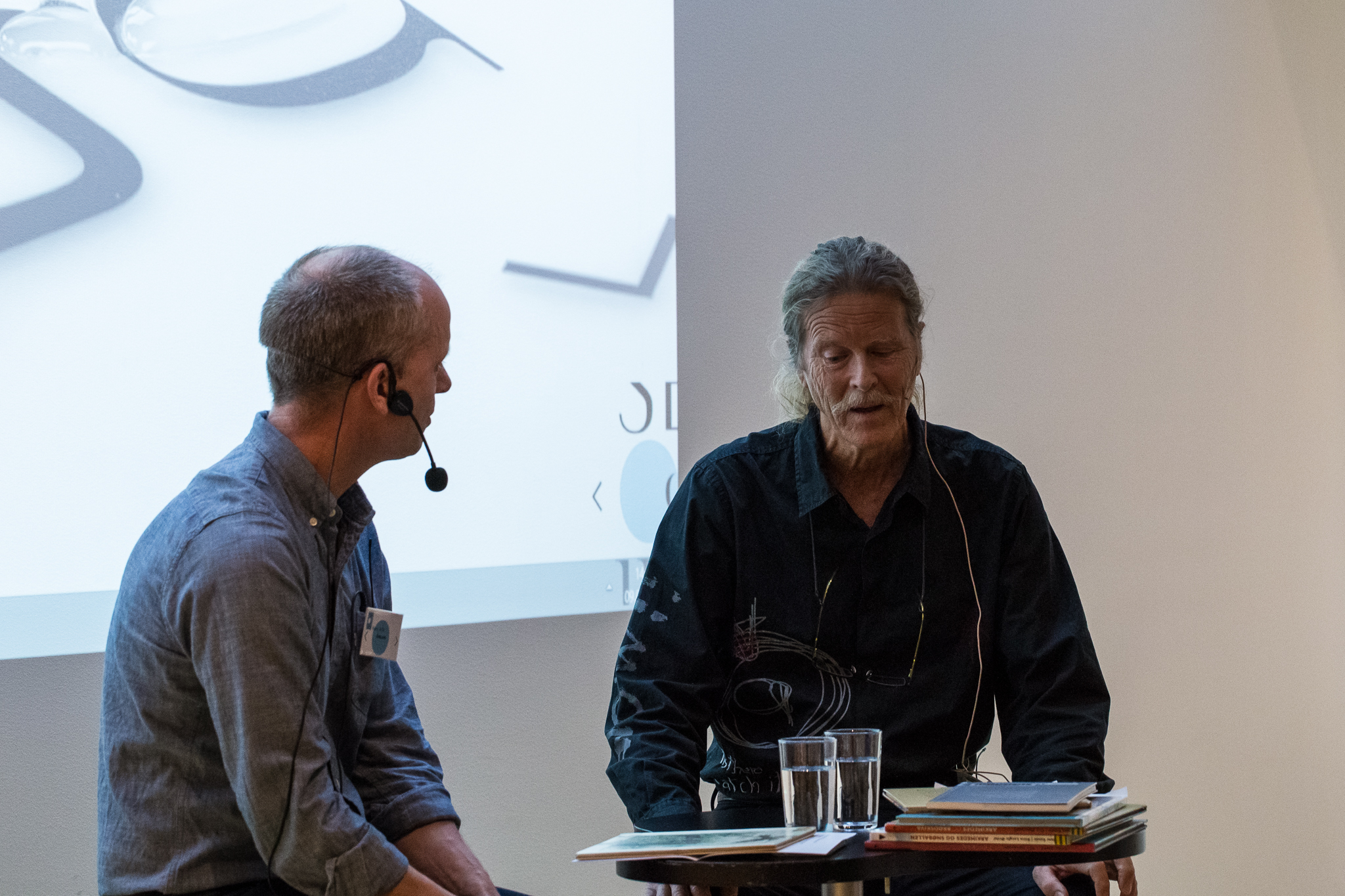 Hans Sande i samtale med Bjørn Arild Ersland